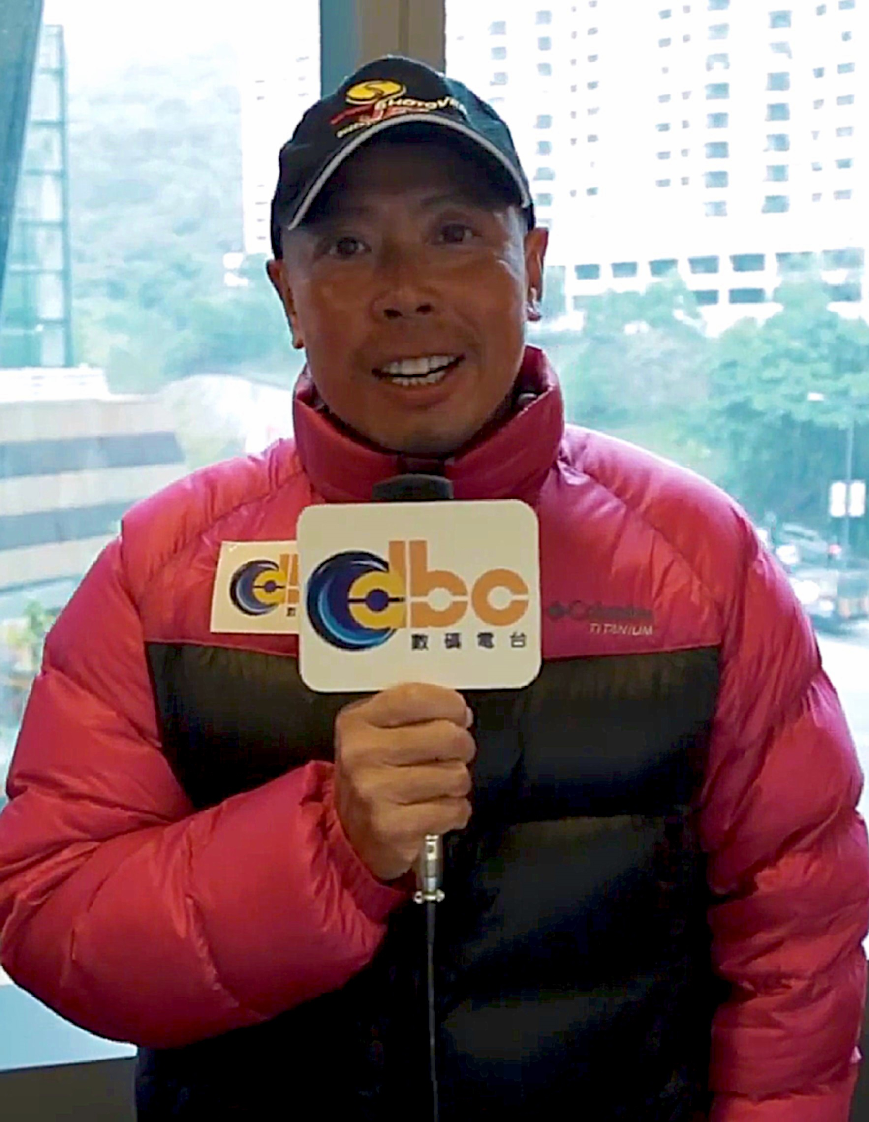 中文（香港）: 白花油國際有限公司第二代繼承人